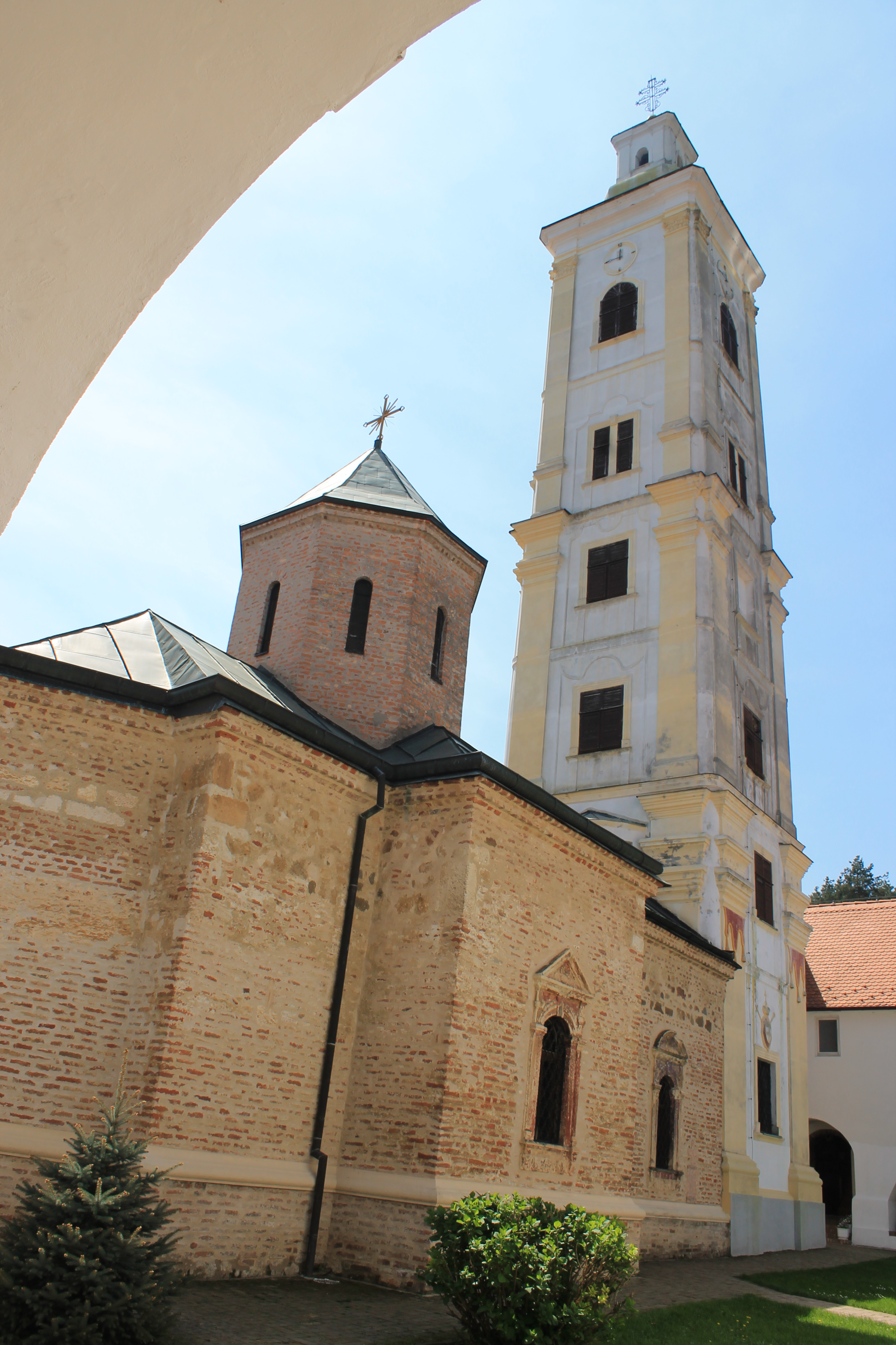 Manastir Velika Remeta, april 2018.